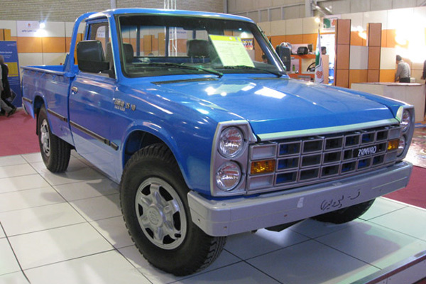 زامیاد